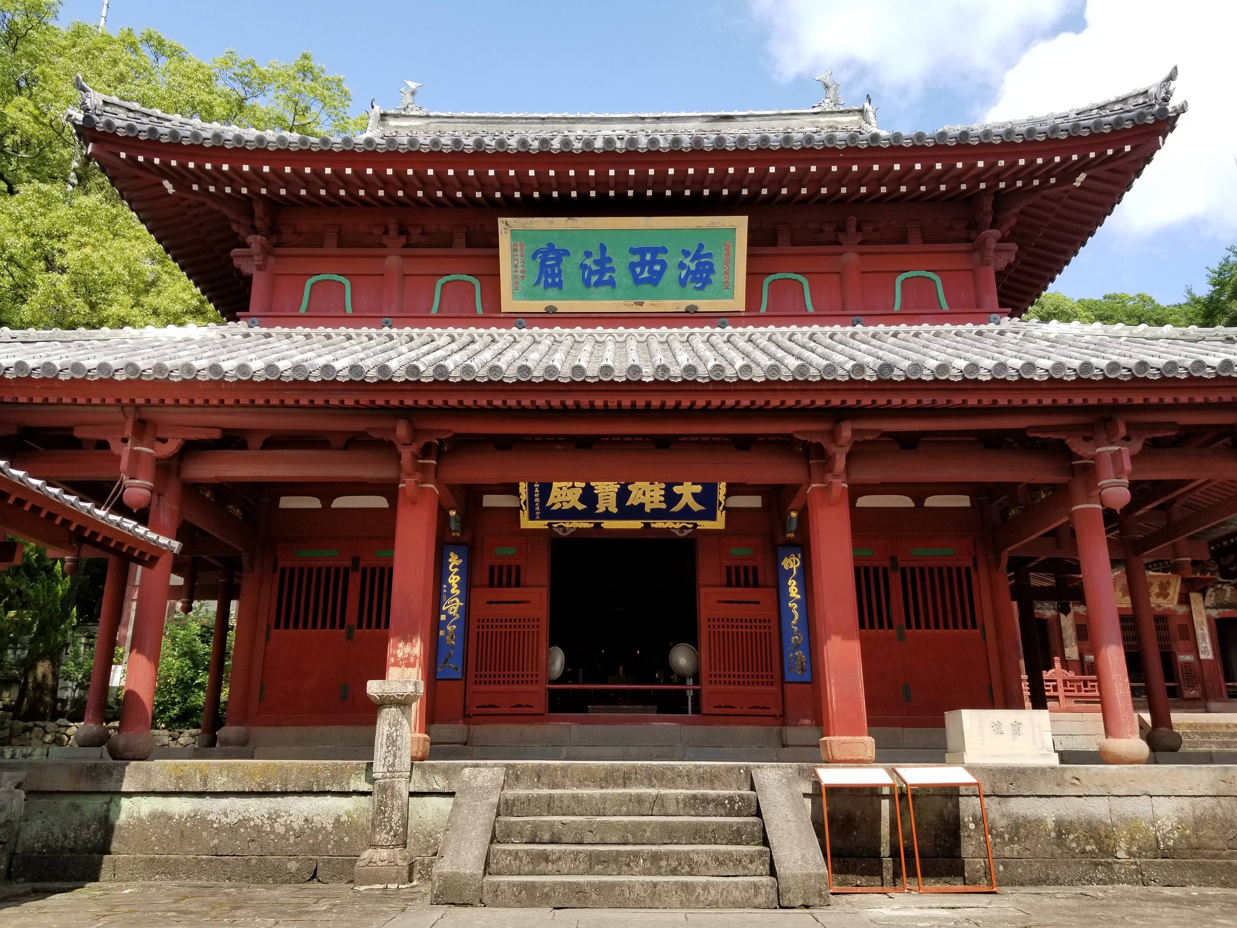 崇福寺大雄宝殿（長崎県長崎市）